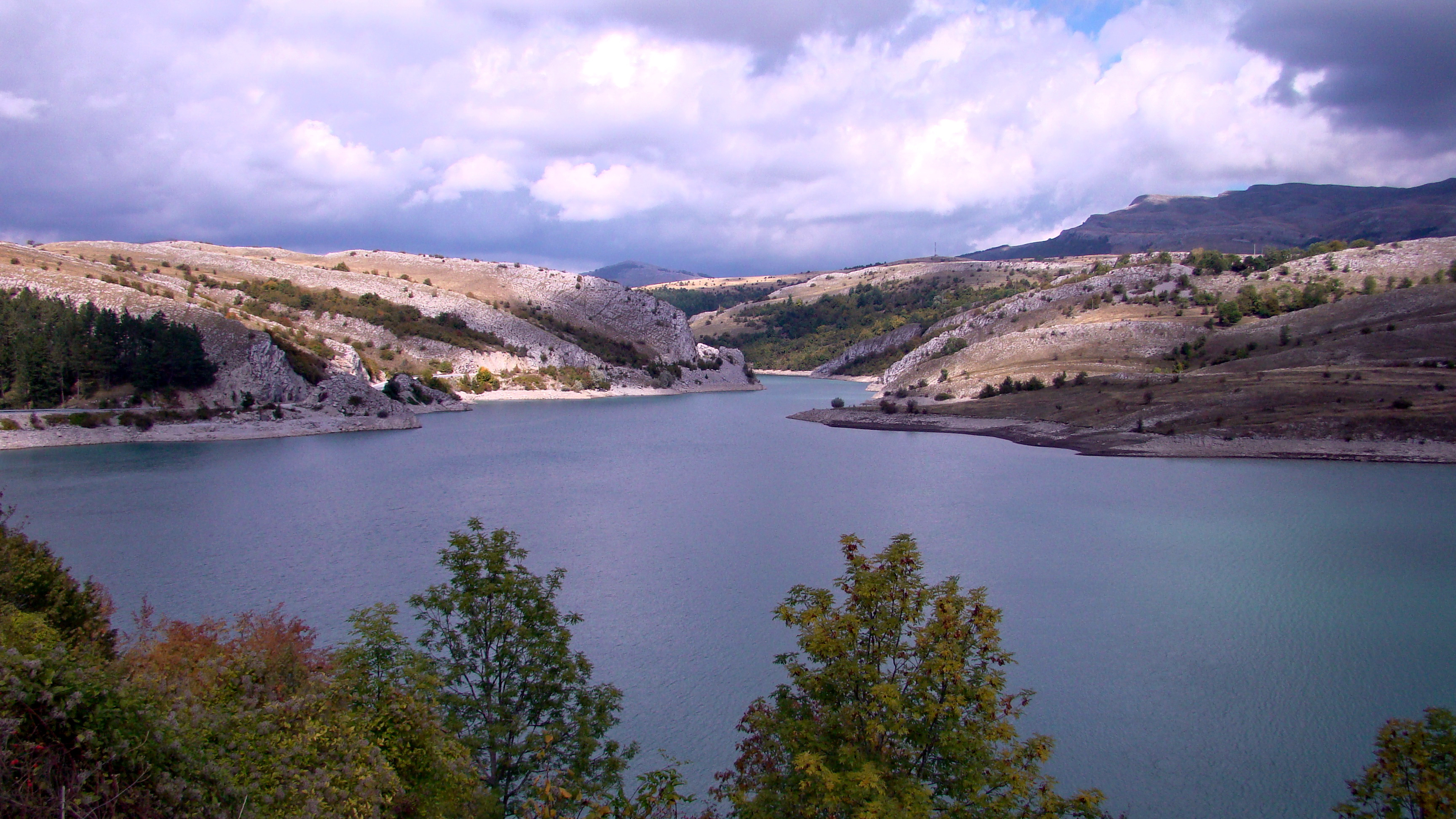 Српски (ћирилица): Парк природе Језеро Клиње - Мушница This image was uploaded as part of Trace of Soul 2016.